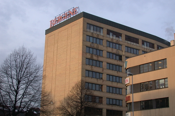 Bergenebygget, som huset Bergene sjokoladefabrikk fram til 1990. Københavngata 10 på Rodeløkka i Oslo.